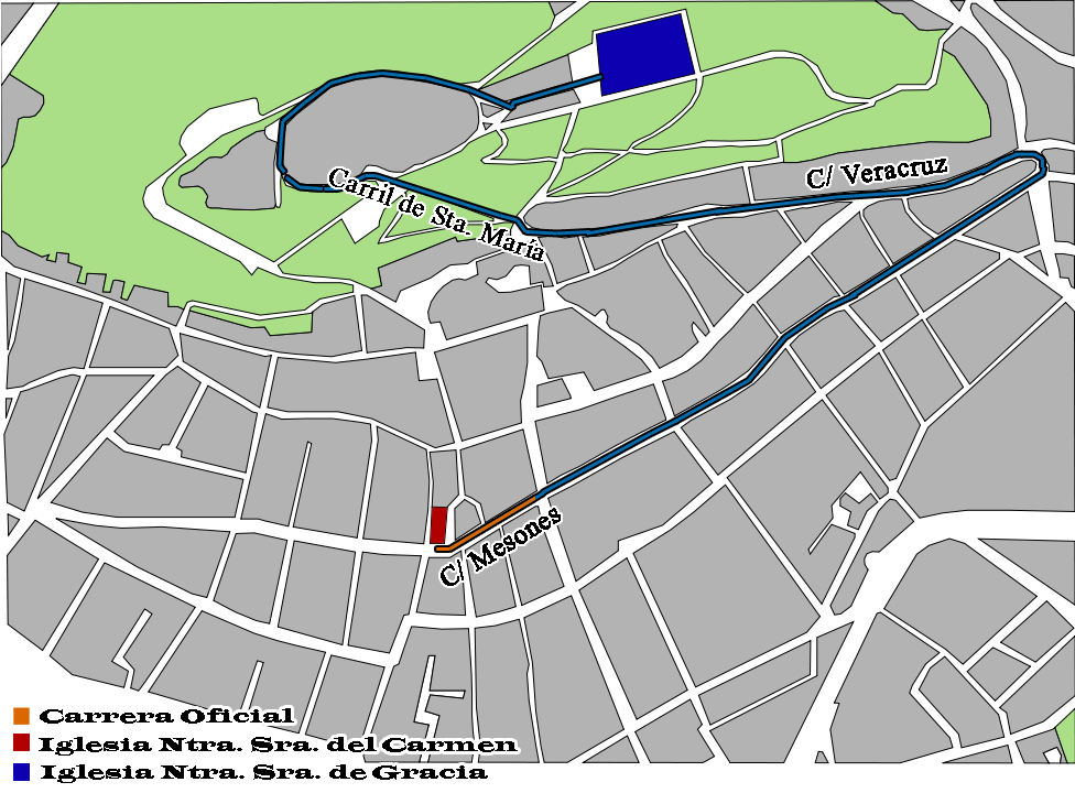 Recorrido de la Hermandad del Calvario